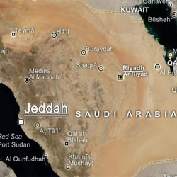 Immagine satellitare di Jedda